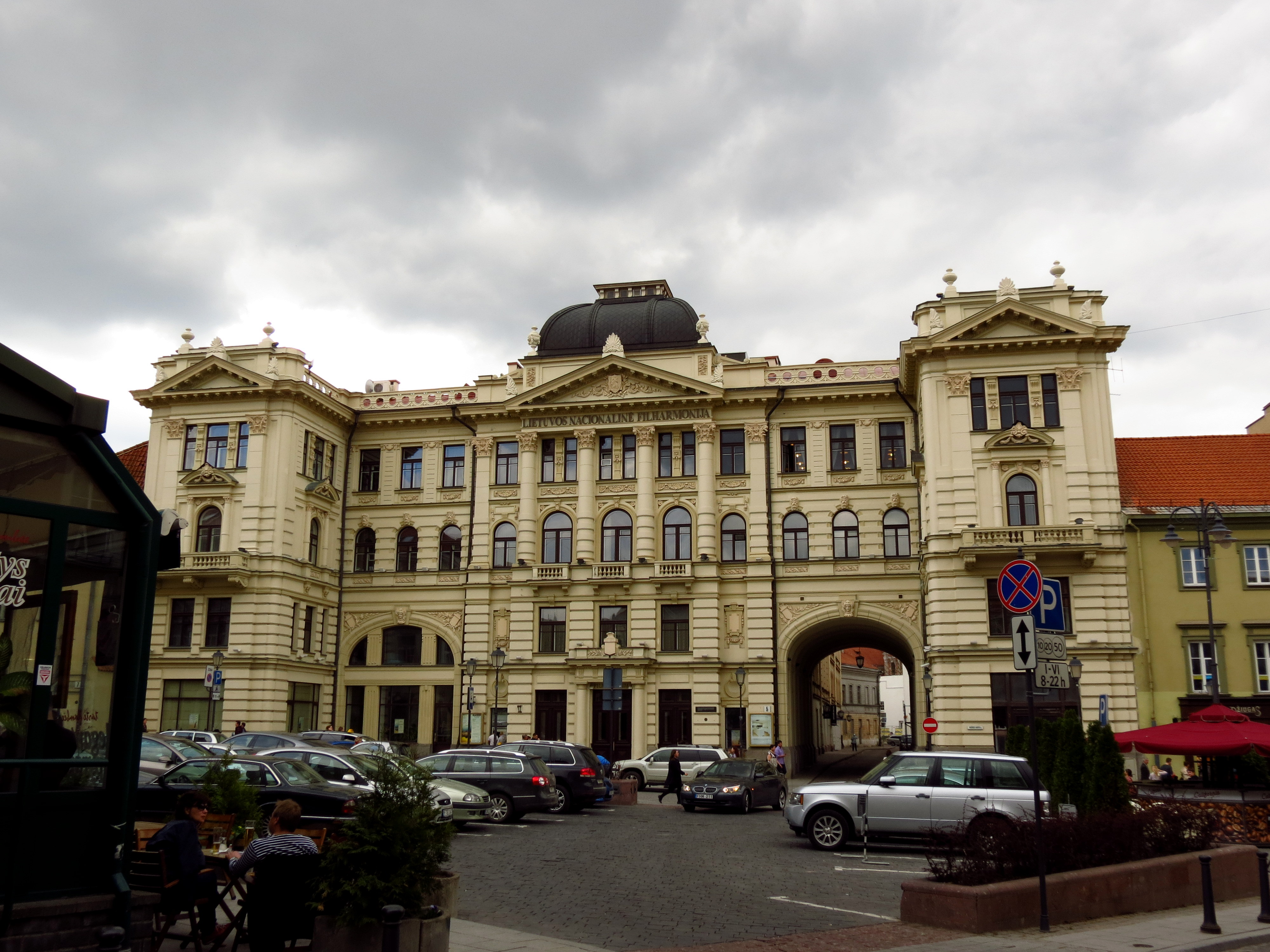 Vue de Vilnius.